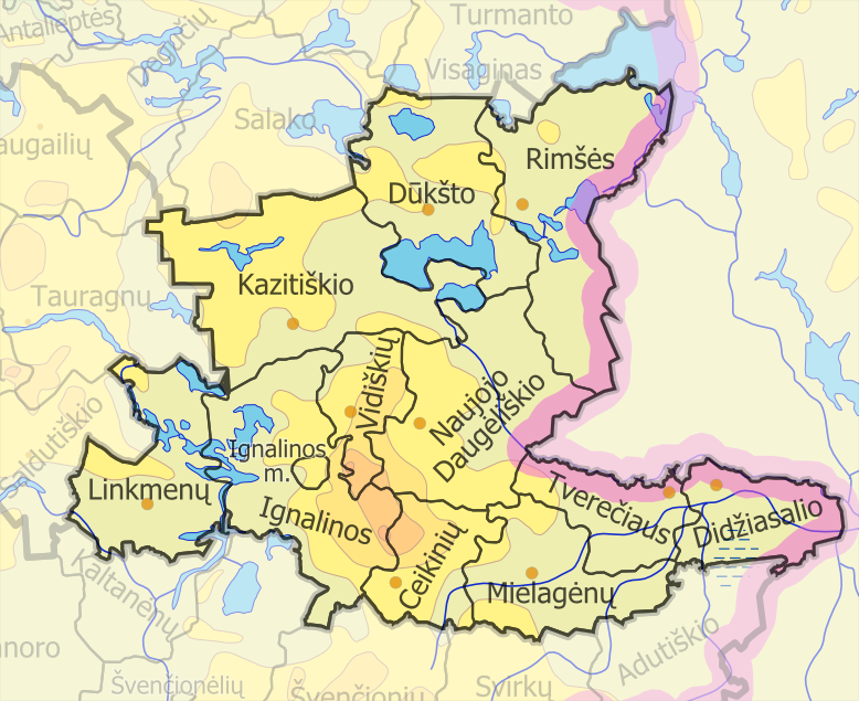 Ignalinos rajono savivaldybės seniūnijos (lt::image:LietuvosSeniunijos.png)